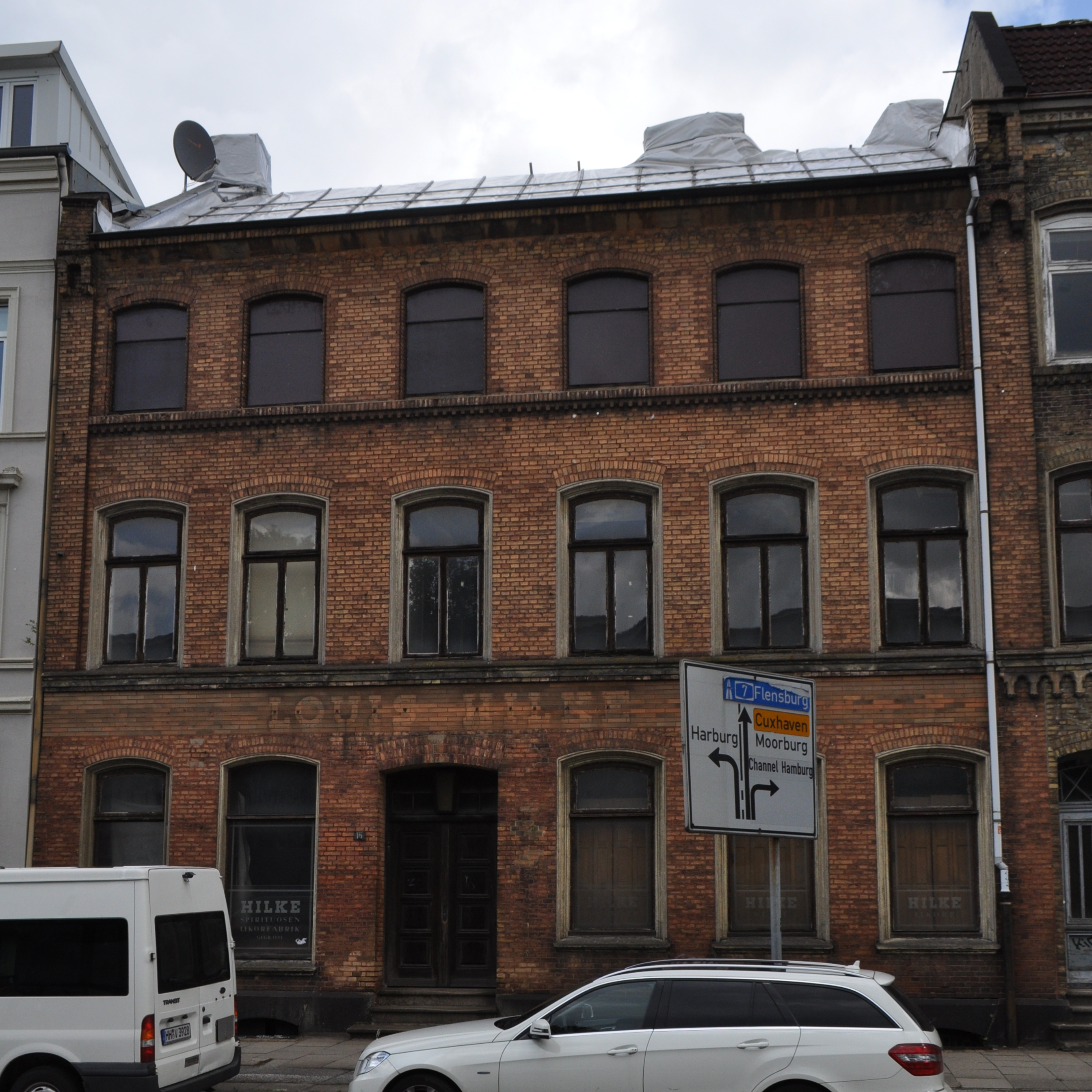 Wohngeschäftshaus Karnapp 15 in Hamburg-Harburg. This is a photograph of an architectural monument.